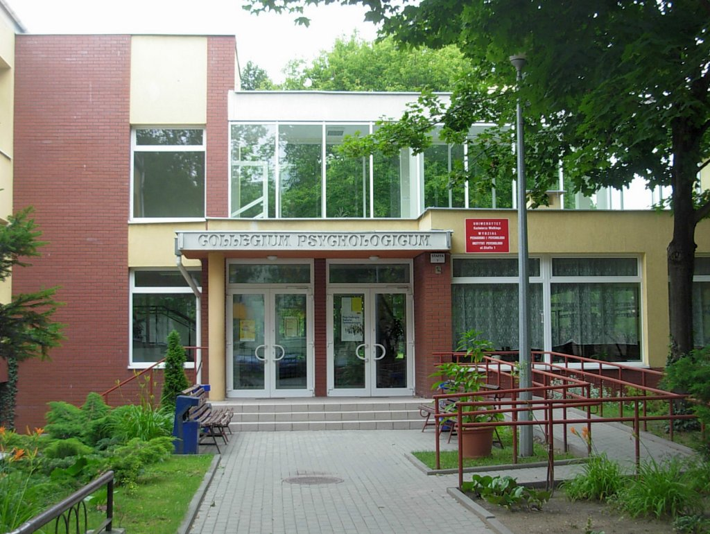 Collegium Psychologicum Uniwersytetu Kazimierza Wielkiego w Bydgoszczy - ul. Staffa 1 (Wyżyny)